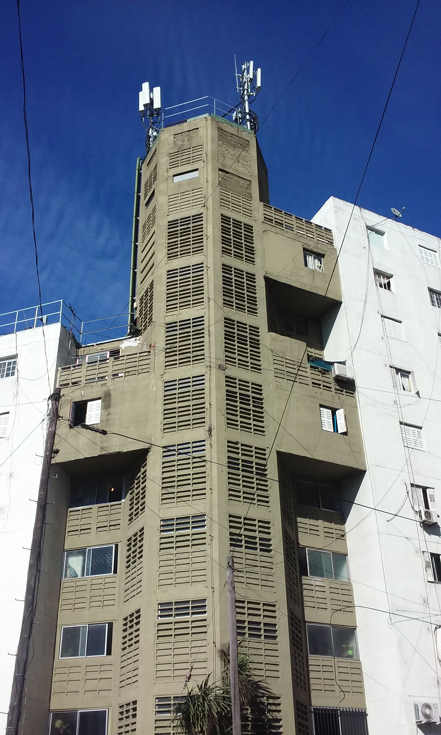 Conjunto Comandante Piedrabuena en el barrio de Mataderos, ciudad de Buenos Aires. Nucleo de escaleras y tanque de agua.